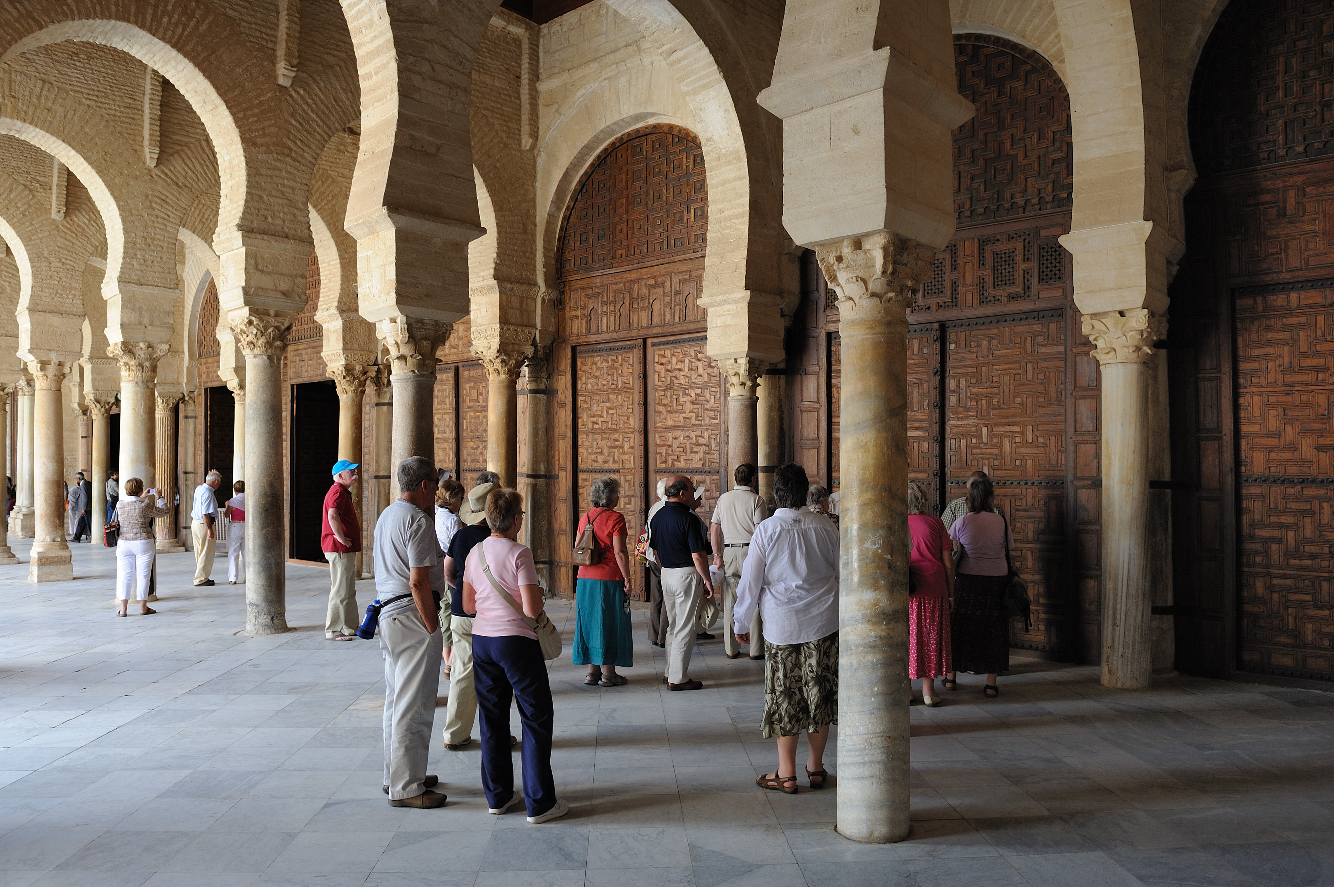 Touristes dans le portique qui précède la salle de prière, devant les portes de cette dernière, dans la Grande Mosquée de Kairouan, en Tunisie.